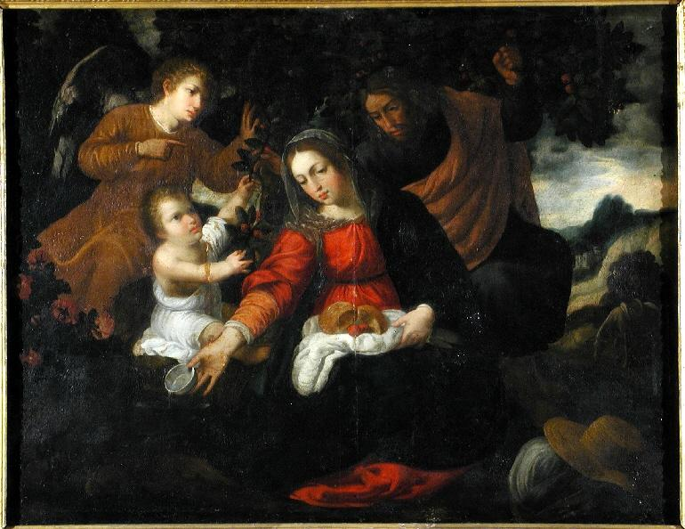 La obra representa un descanso en la huida hacia Egipto que emprendieron los miembros de la Sagrada Familia para impedir que el Niño Jesús fuera asesinado por el rey Herodes el Grande.